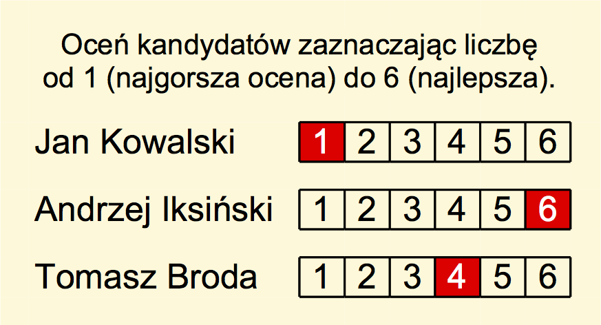 Przykładowa karta do głosowania ocenowego (przedziałowego, interwałowego).